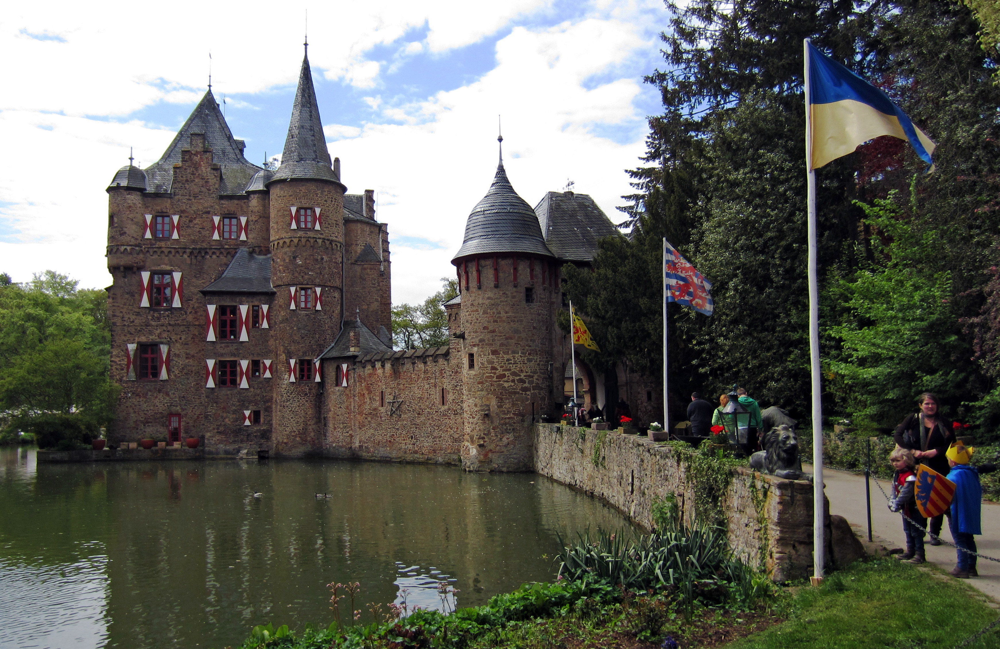 Außenansicht der Burg Satzvey mit Teich, Mechernich-Satzvey This is a photograph of an architectural monument.